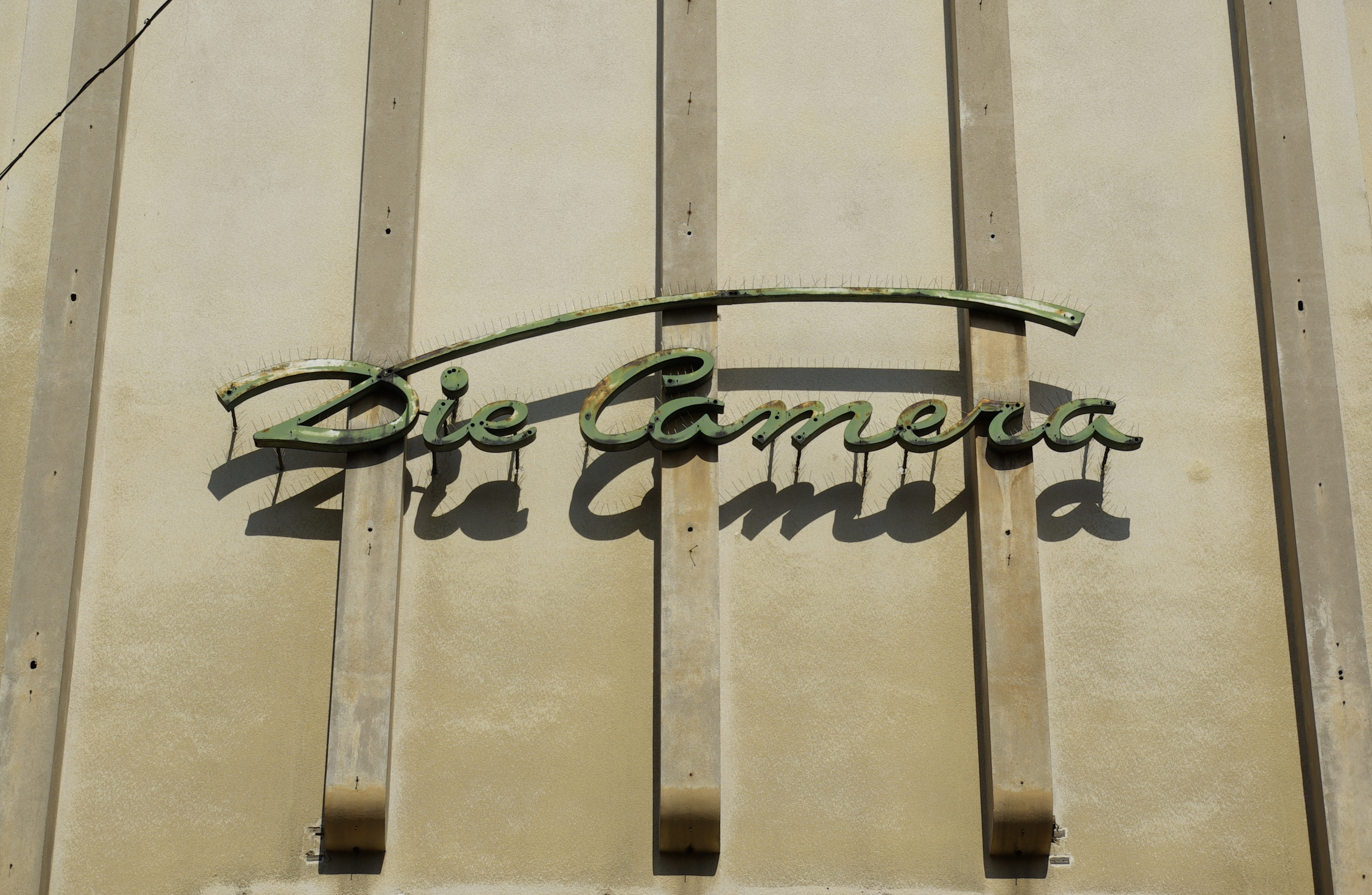 Ehemaliges Kino Die Camera, Schwabacher Straße 149, Fürth